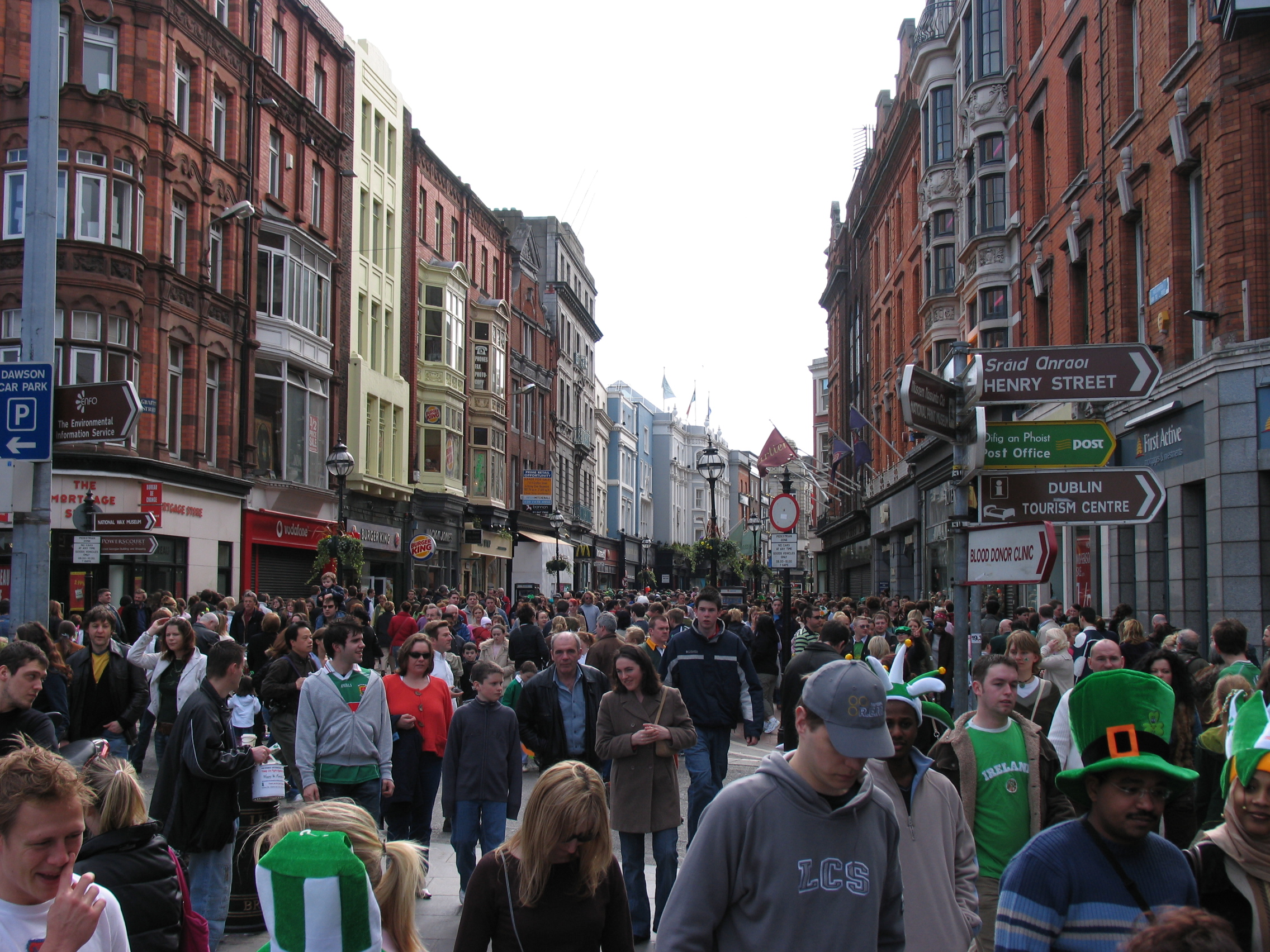 Grafton street in Dublin